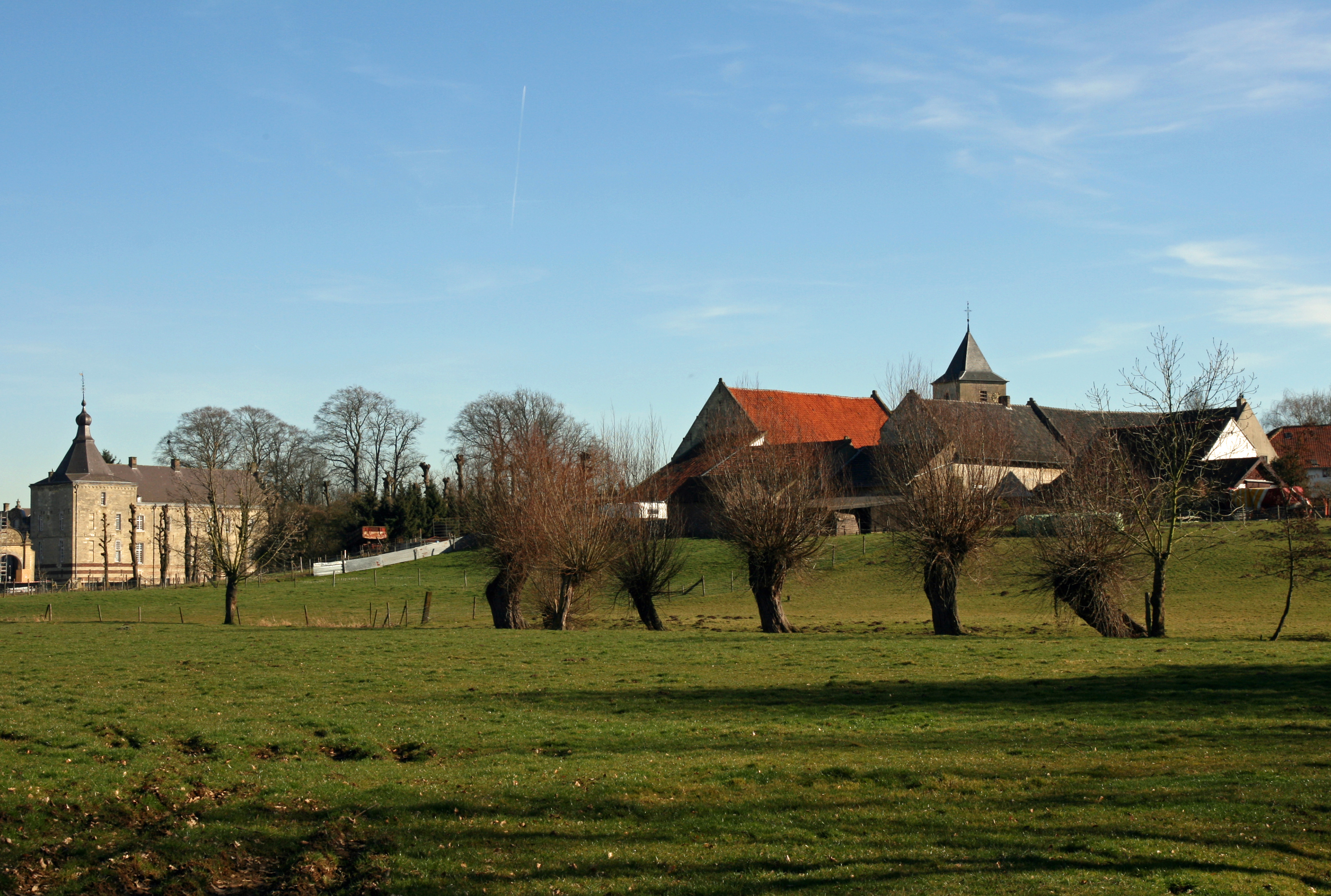 Oud Valkenburg vanaf Kasteel Schaloen